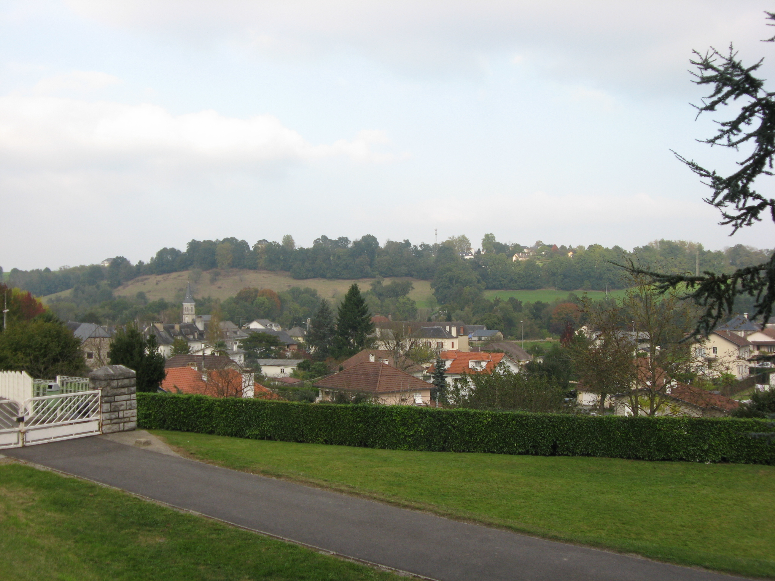 Vue du village de Bidos (Pyrénées Atlantiques) Pyrénées).